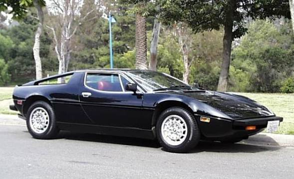 URL: Tag: Img:[IMG]